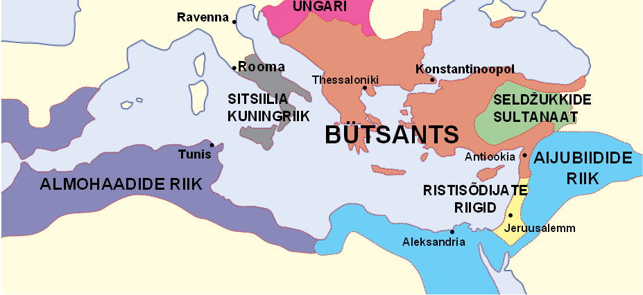 Bütsants (1180)